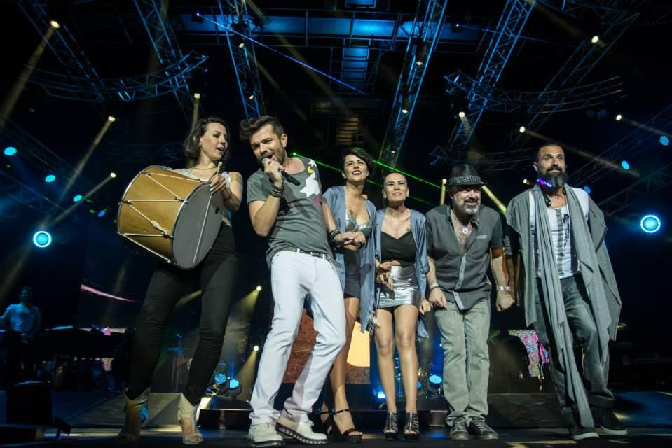 Kenan Doğulu'nun 2014 İstanbul konserinde çekilmiştir.